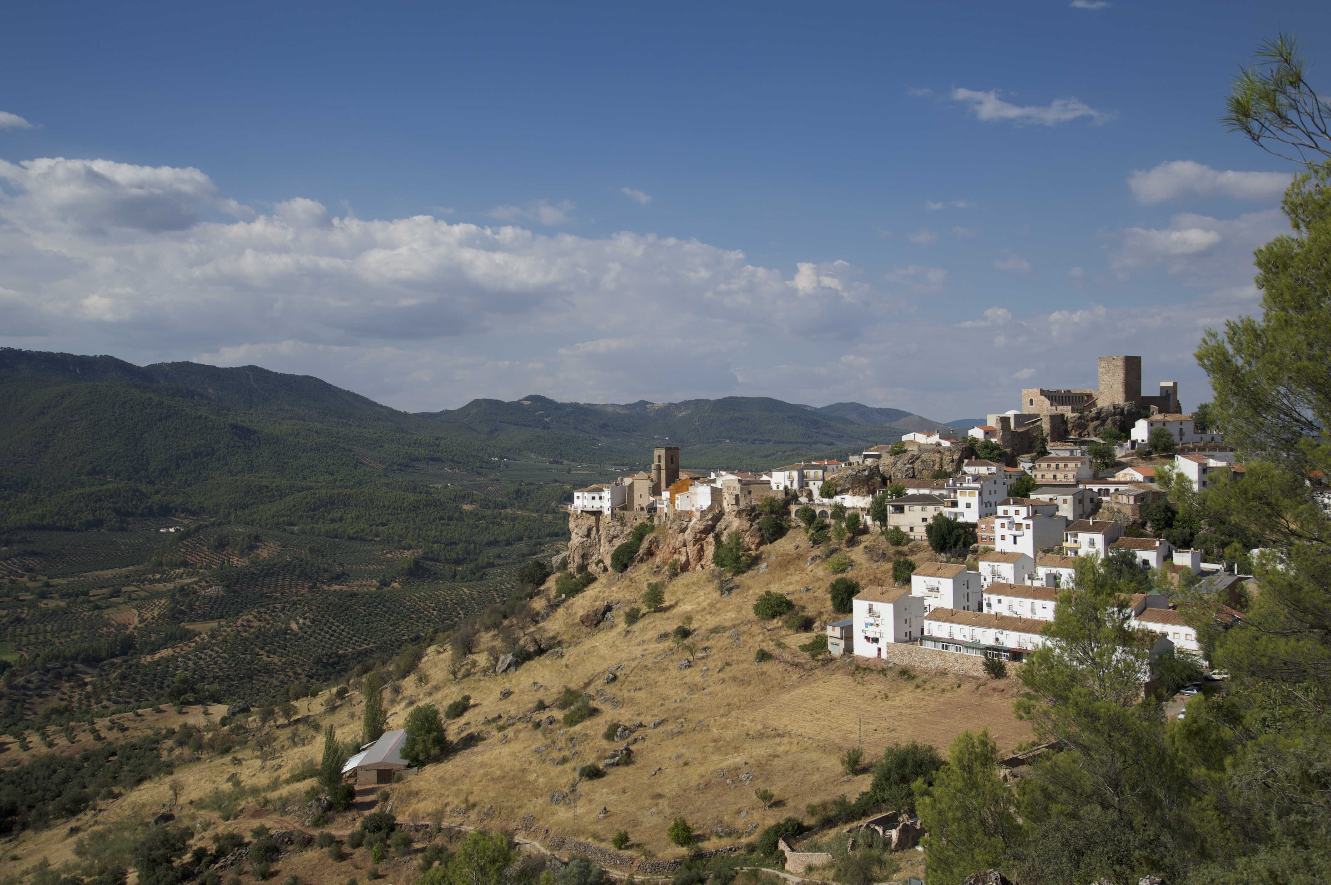 Parque natural de Sierra María-Los Vélez This is a photography of a Site of Community Importance in Spain with the ID: ES6110003. Natura2000 entry, EEA entry